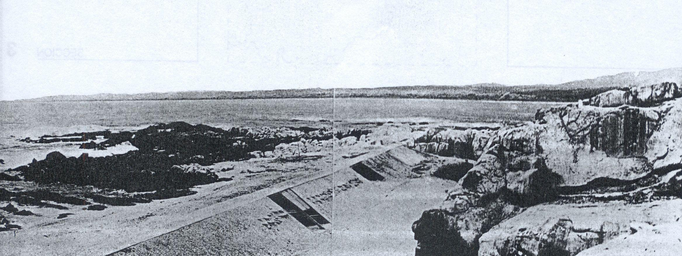 Arquitectura experimental de Manuel Casanueva Carrasco. Fundamento de la primera obra -entre varias- proyectada por Manuel Casanueva C., construida con sus alumnos y que encabeza un período de la Escuela de Arquitectura de la Pontificia Universidad Católica de Valparaíso (Chile) llamado 'Travesías por América', que consiste en la refundación de América desde una visión poético-arquitectónica, realizándose desde 1984 hasta estos días.